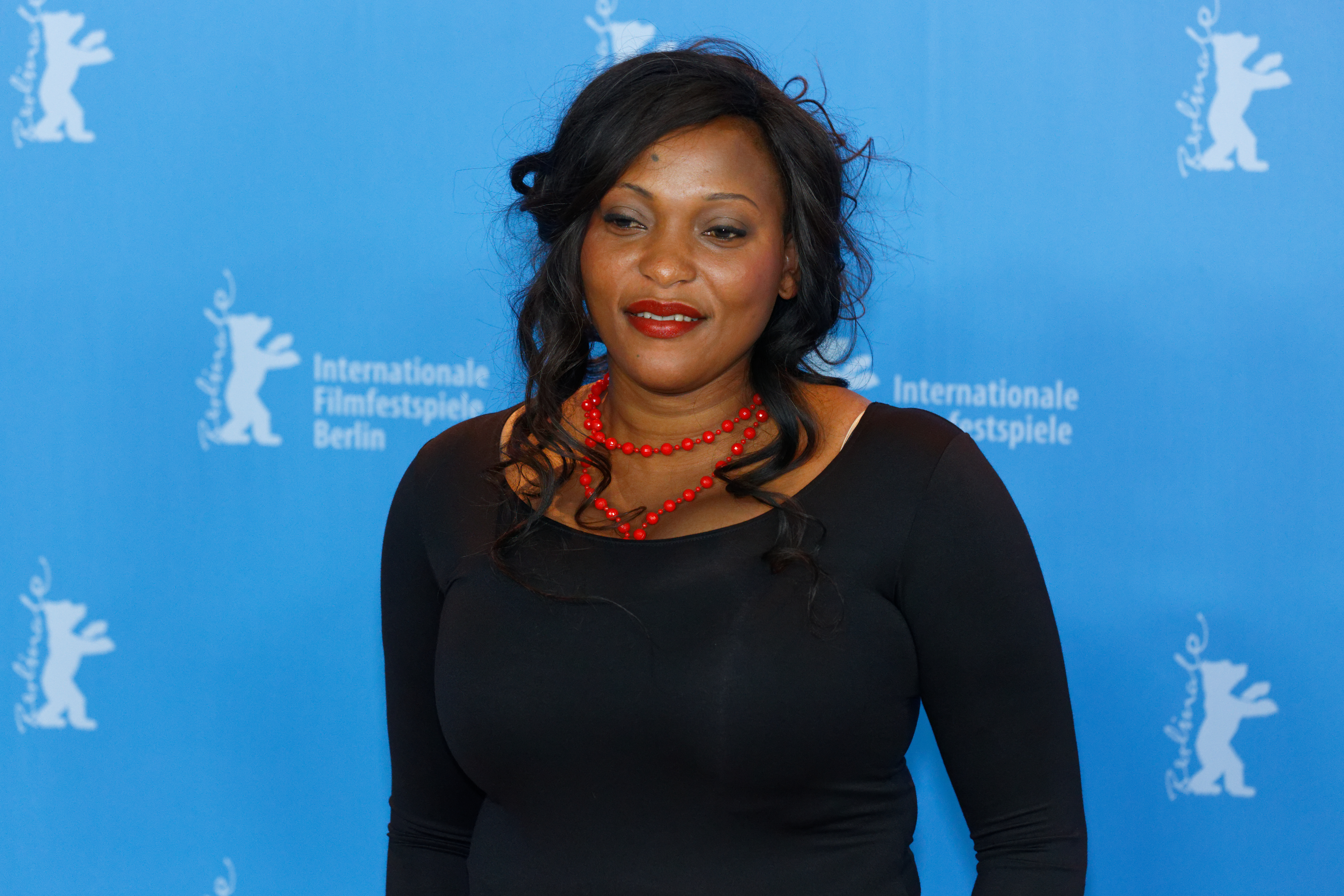 Véro Tshanda Beya beim Photo Call zu Félicité bei der Berlinale 2017